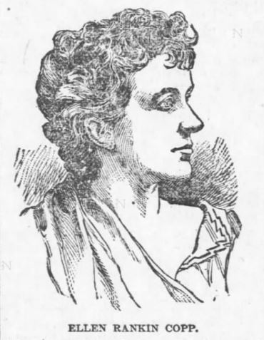 Die Bildhauerin Ellen Rankin Copp (1853-1901), abgebildet in The Topeka State Journal v. 28. September 1892